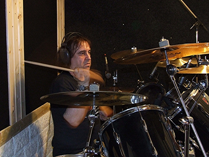 Bateristul Doru Istudor „M.S.” în studio la repetiții, Arad, 2010.